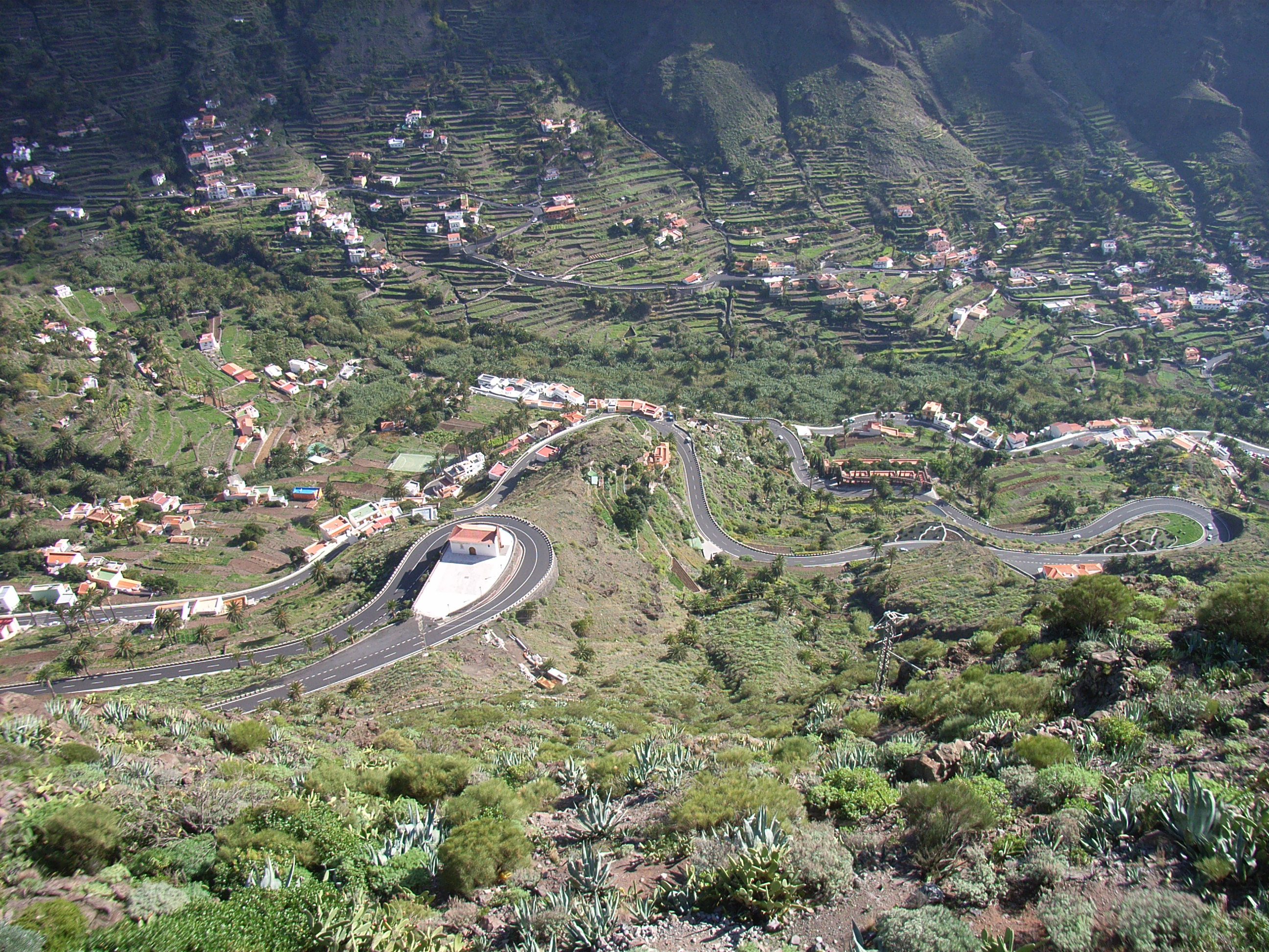 La Gomera - Serpentinen